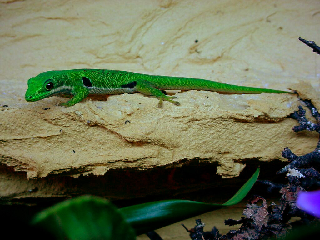 Phelsuma quadriocellata quadriocellata, Weibchen, Terrarienaufnahme